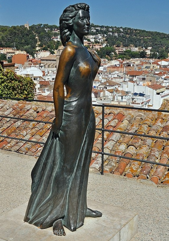 la selva-Cataluña